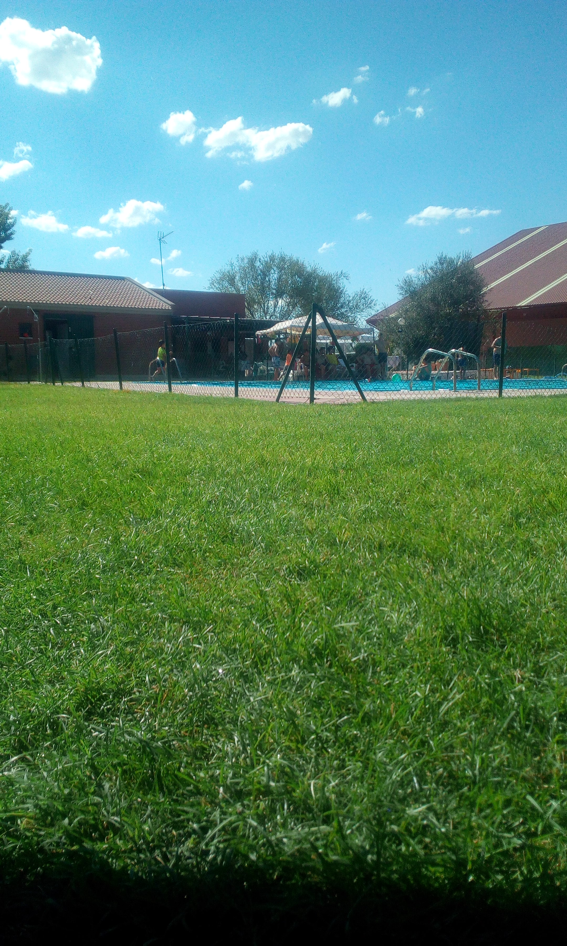 Una imagen que muestra como son las piscinas de Nueva Villa